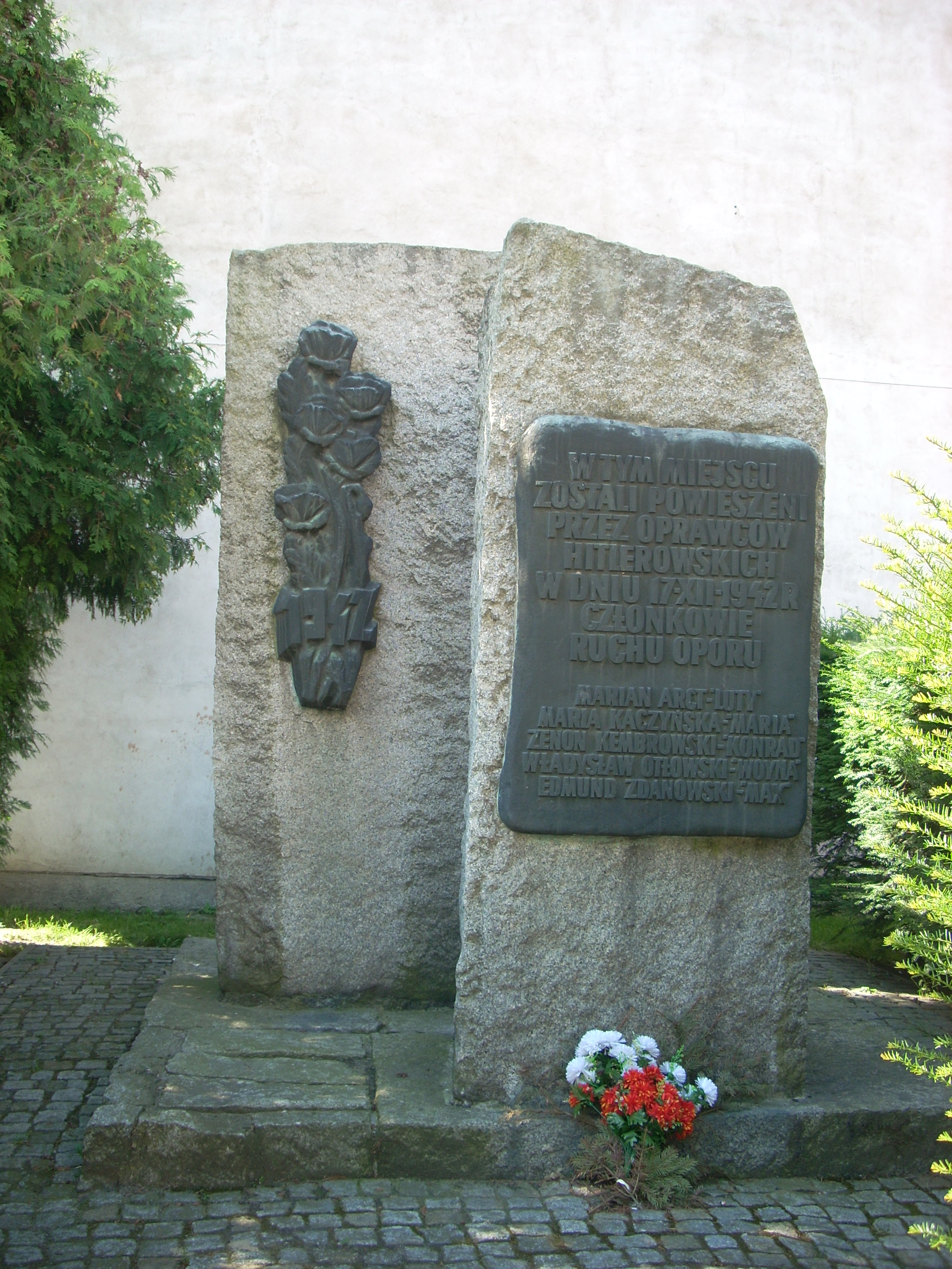 Pomnik na miejscu egzekucji członków ZWZ-AK w Przasnyszu: Mariana Arcta, Marii Kaczyńskiej, Edmunda Zdanowskiego, Zenona Kembrowskiego, Władysława Otłowskiego, powieszonych przez Niemców w publicznej egzekucji 17 grudnia 1942